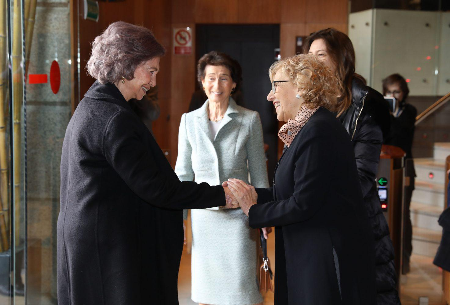 La alcaldesa de Madrid, Manuel Carmena, ha participado hoy, martes 6 de marzo, en la reunión del Patronato de la Escuela Superior de Música Reina Sofía. La Junta de Patronos está formada por un numeroso grupo de personalidades y representantes de instituciones públicas y privadas, entre las que está el Ayuntamiento de Madrid.